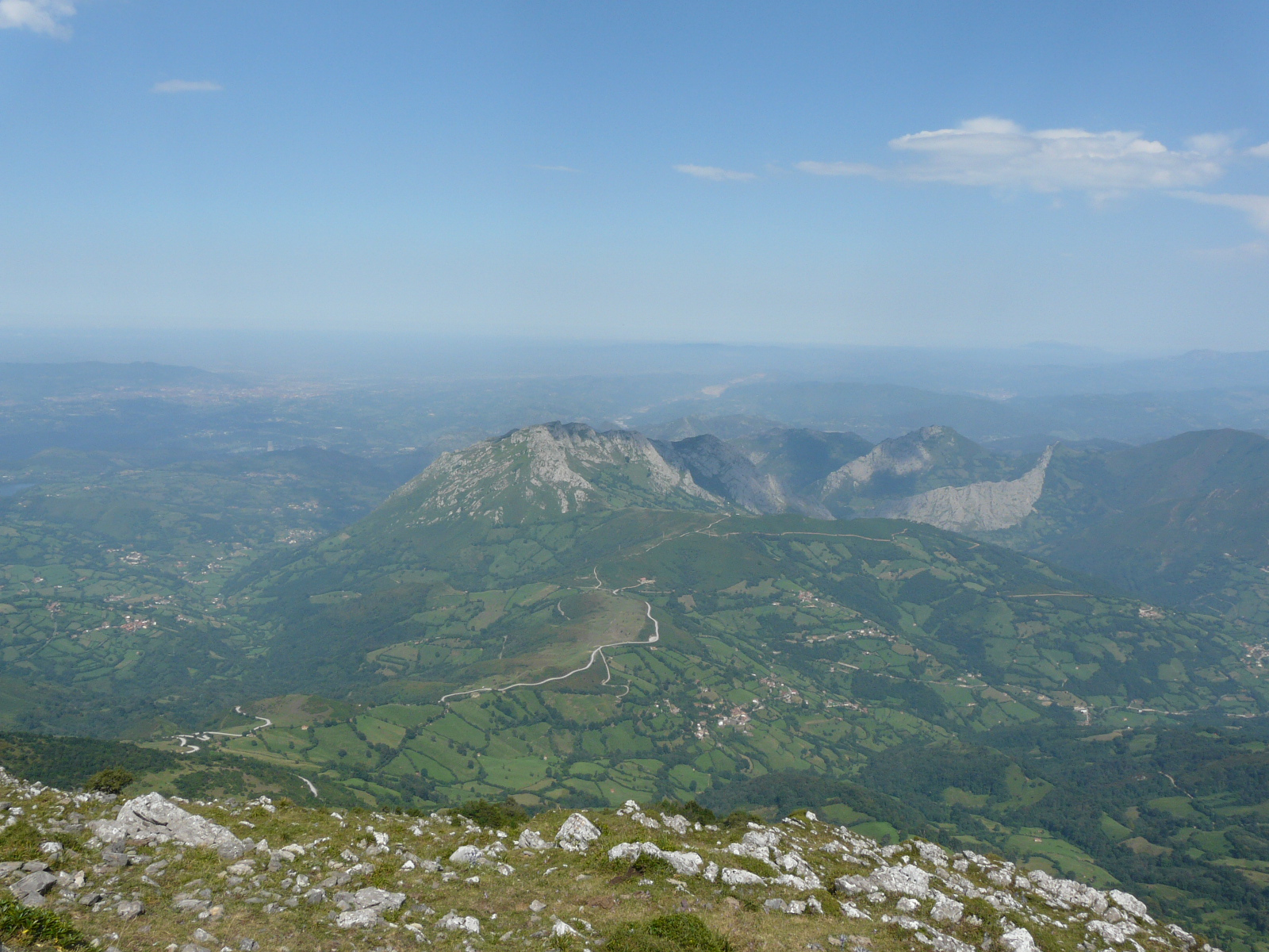 La vista desde cerca de la cima de L'Angliru. Oviedo es visible encima del centro a la izquierda